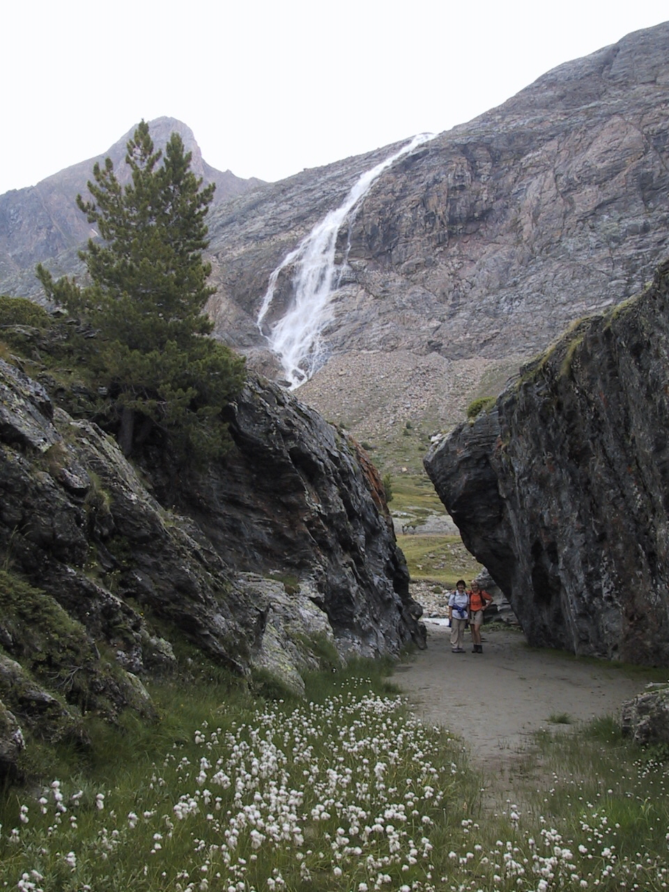 Der Wasserfall in Hintermartell, der Zufall (= beim Wasserfall) den Namen gegeben hat